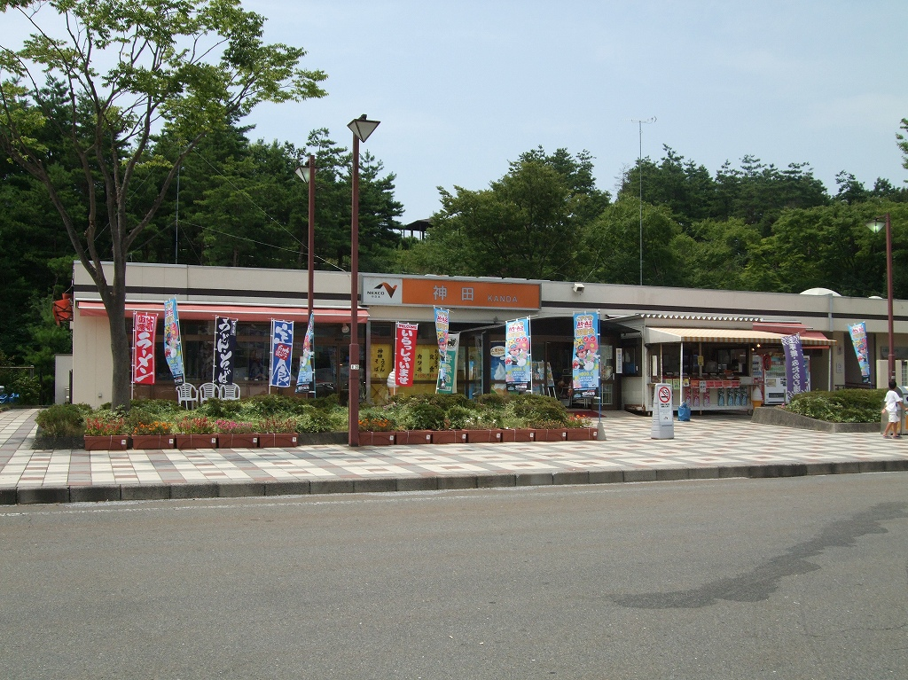 ・北陸自動車道 神田パーキングエリア（下り線・新潟方面）